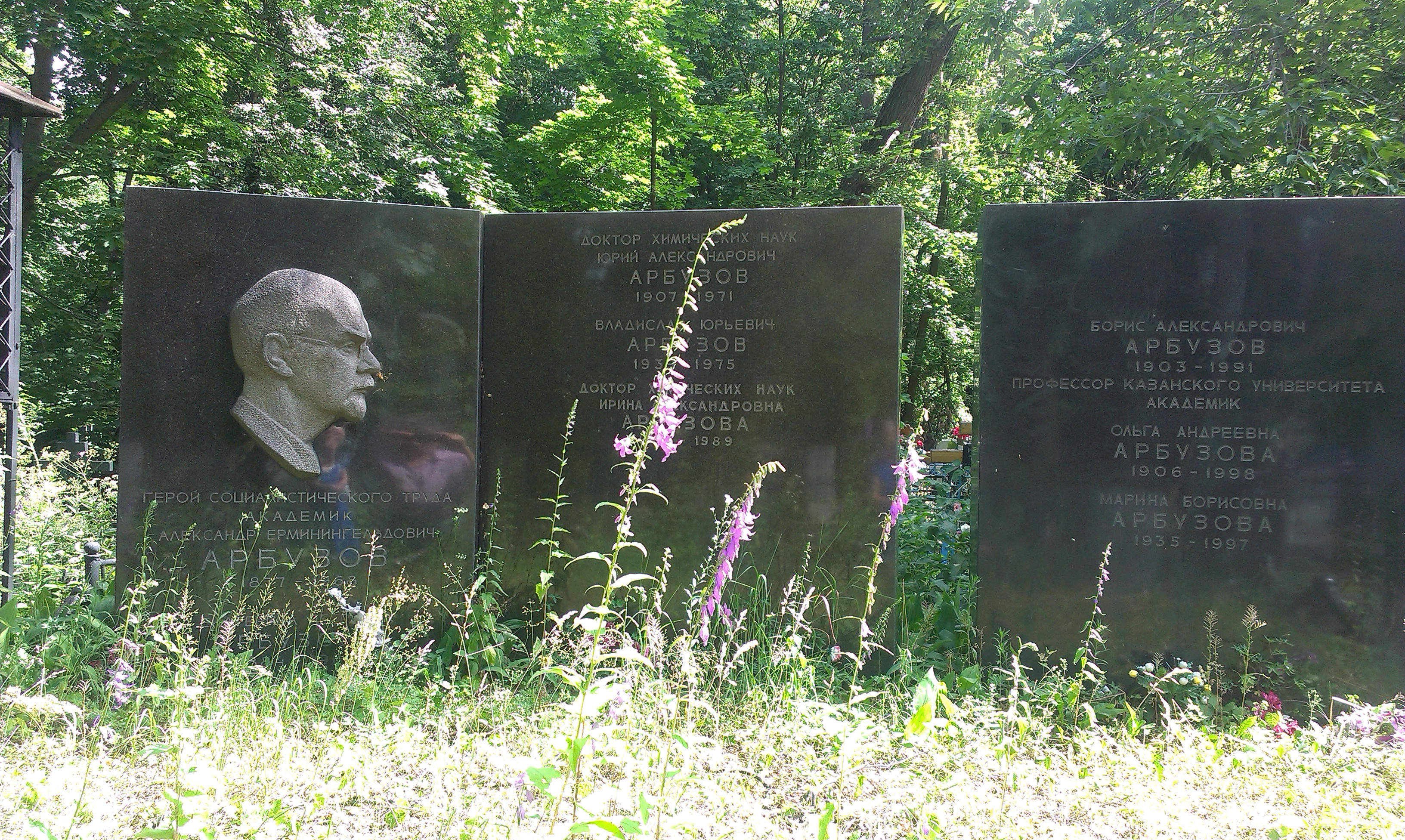 Арское кладбище